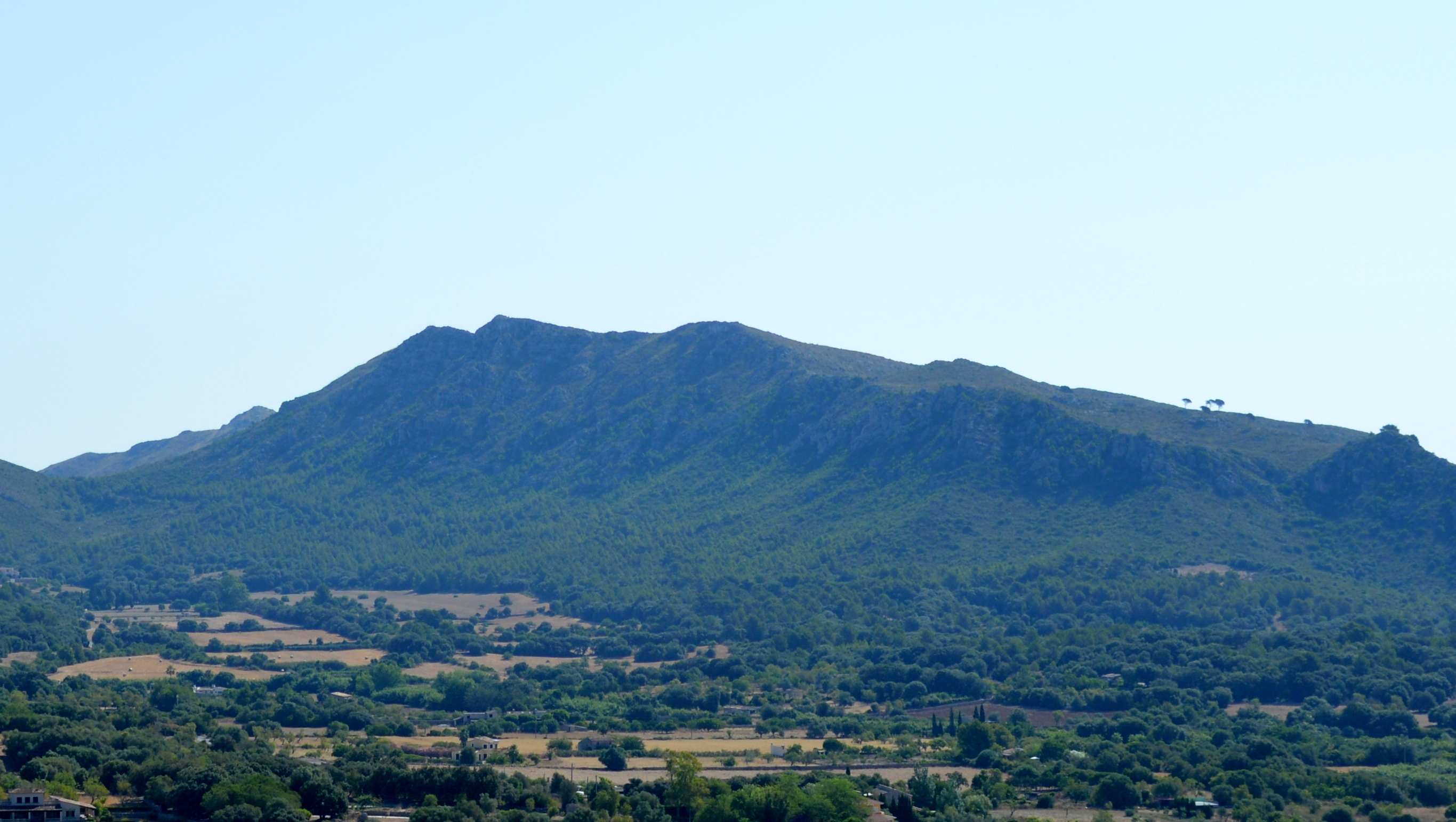 Puig des Raco